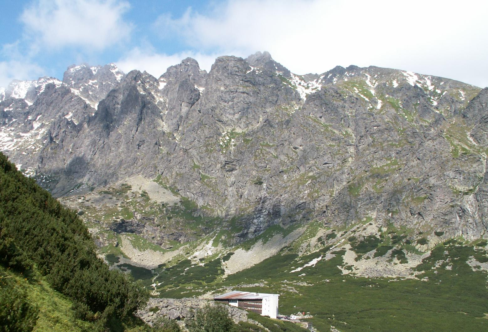 Wielickie granaty, widok z Tatrzańskiej Magistrali, Autor: mychaus